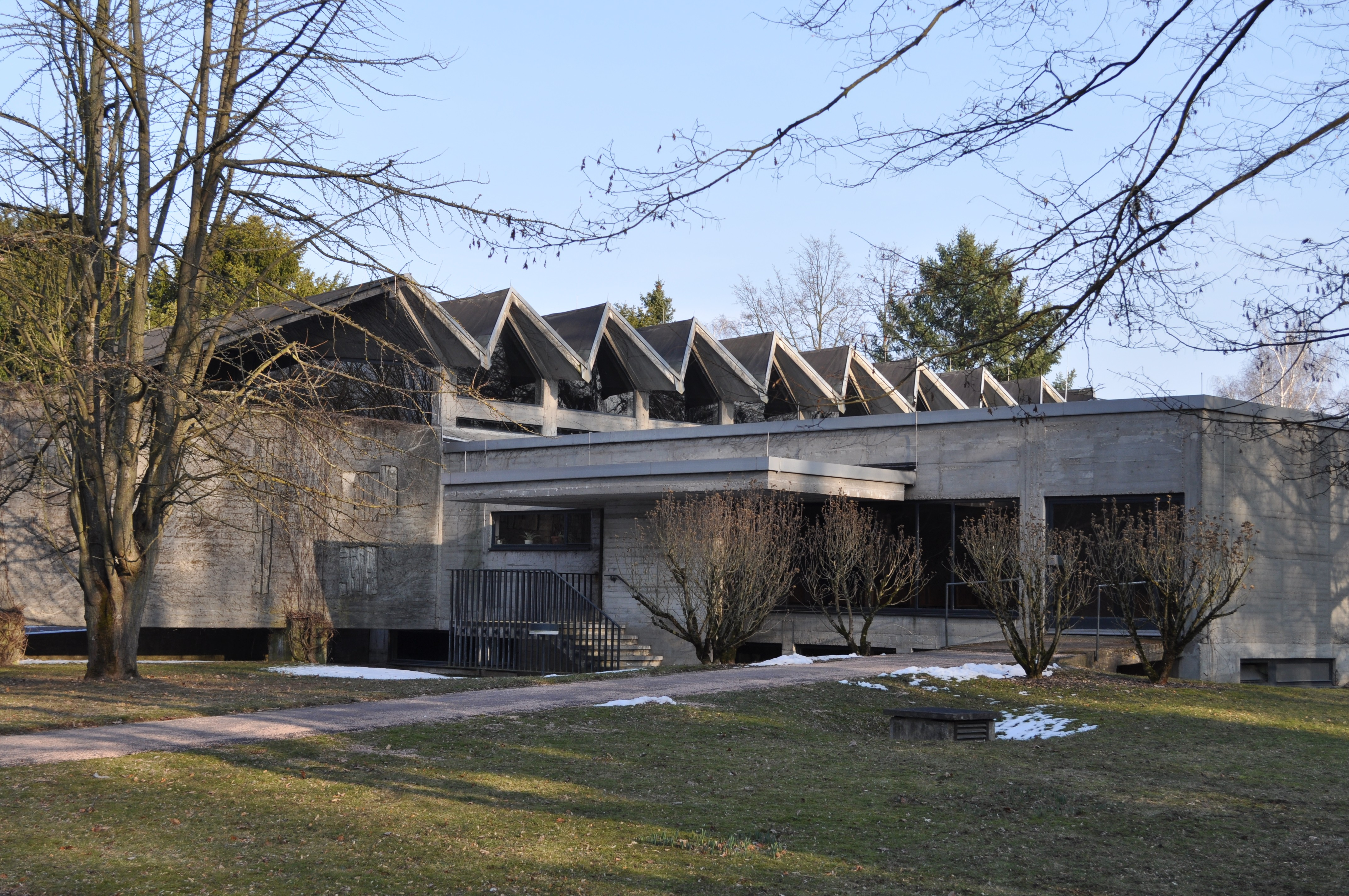 Trauerhalle des Friedhofs Westhausen